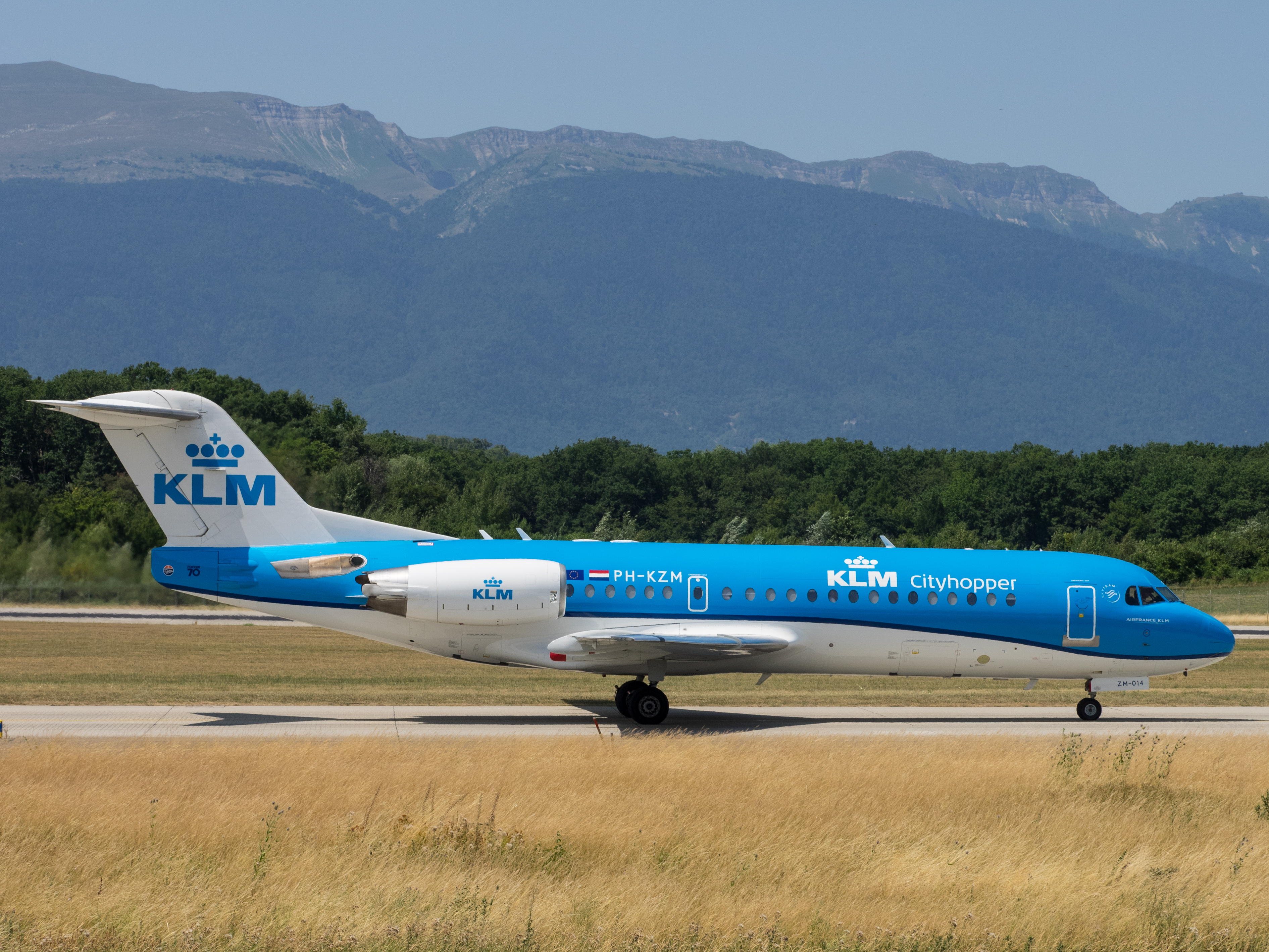 GVA 11.07.2015